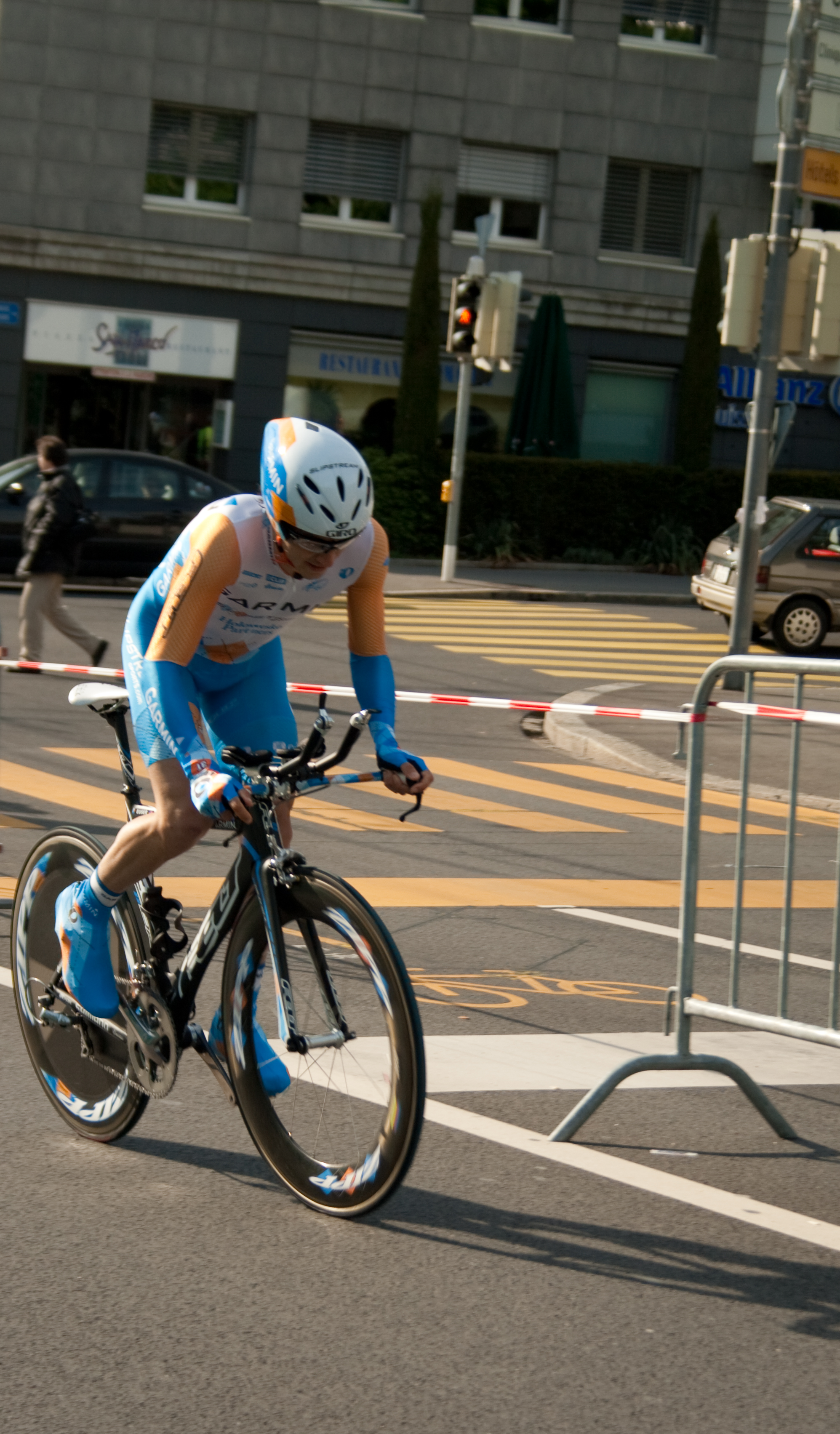 Lucas Euser lors du prologue du Tour de Romandie 2009